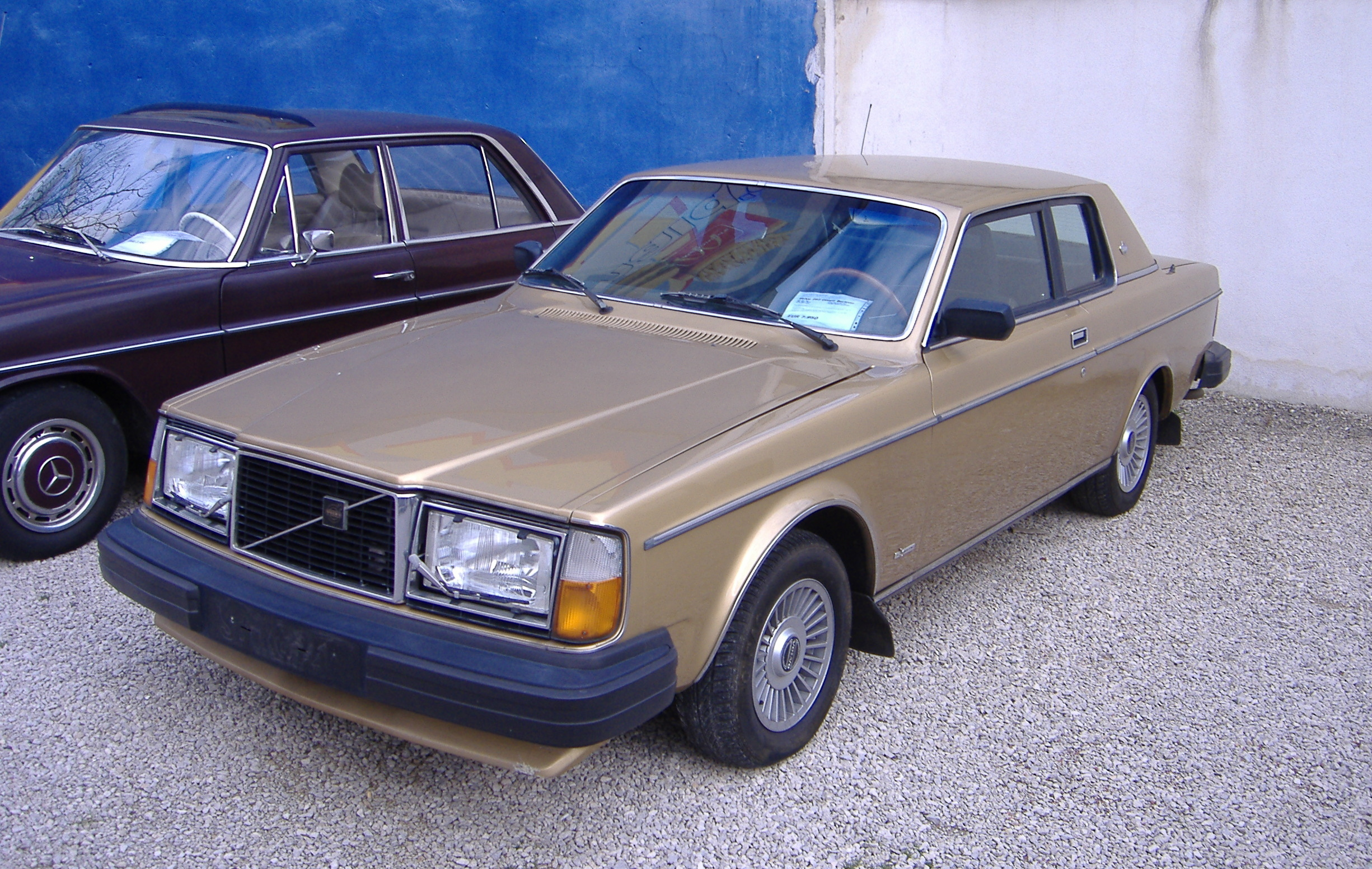 Volvo 262 C Bertone